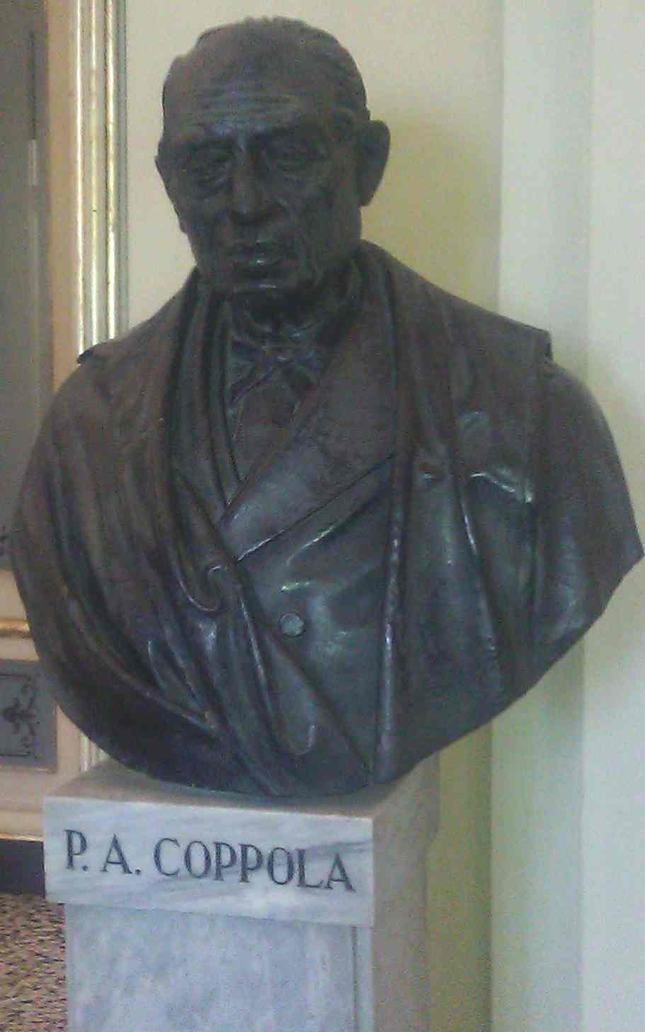 busto di Pietro Antonio Coppola. foto di Pietro Rizzo